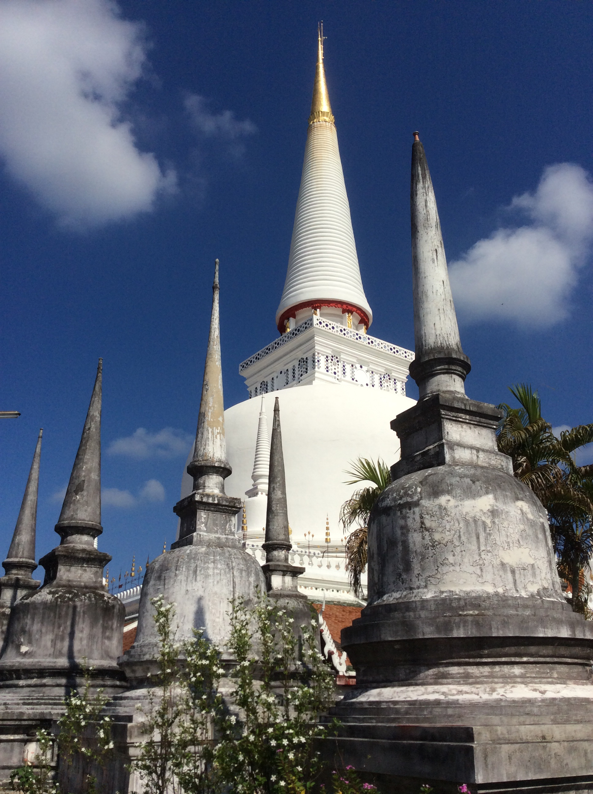 วัดพระมหาธาตุวรมหาวิหาร